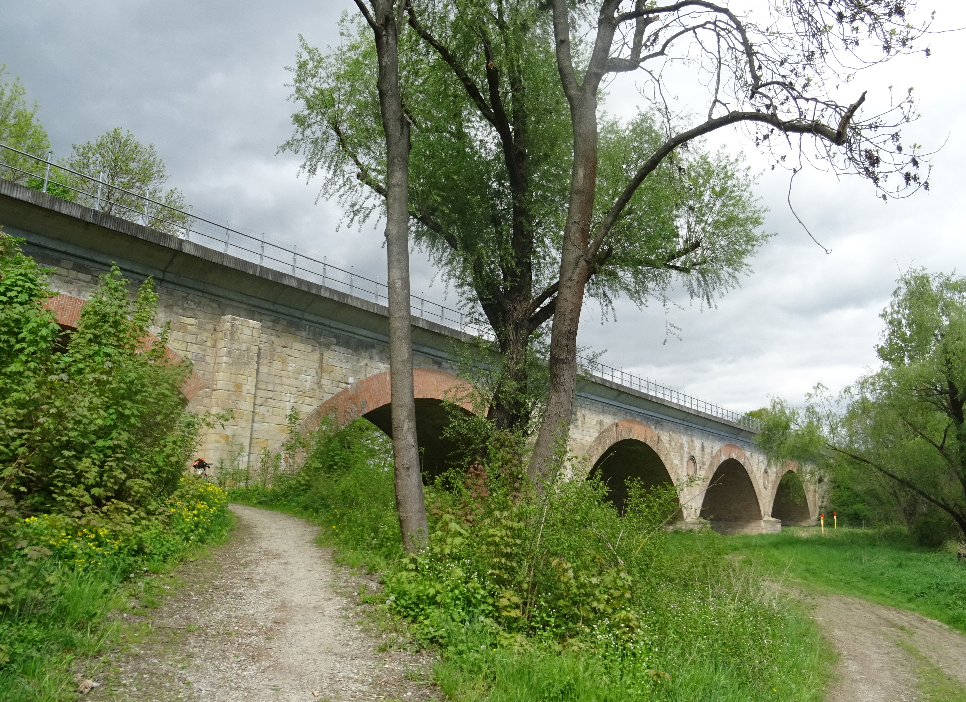 Bodebrücke der Kanonenbahn zwischen Löbnitz und Hohenerxleben, Blick von Südosten